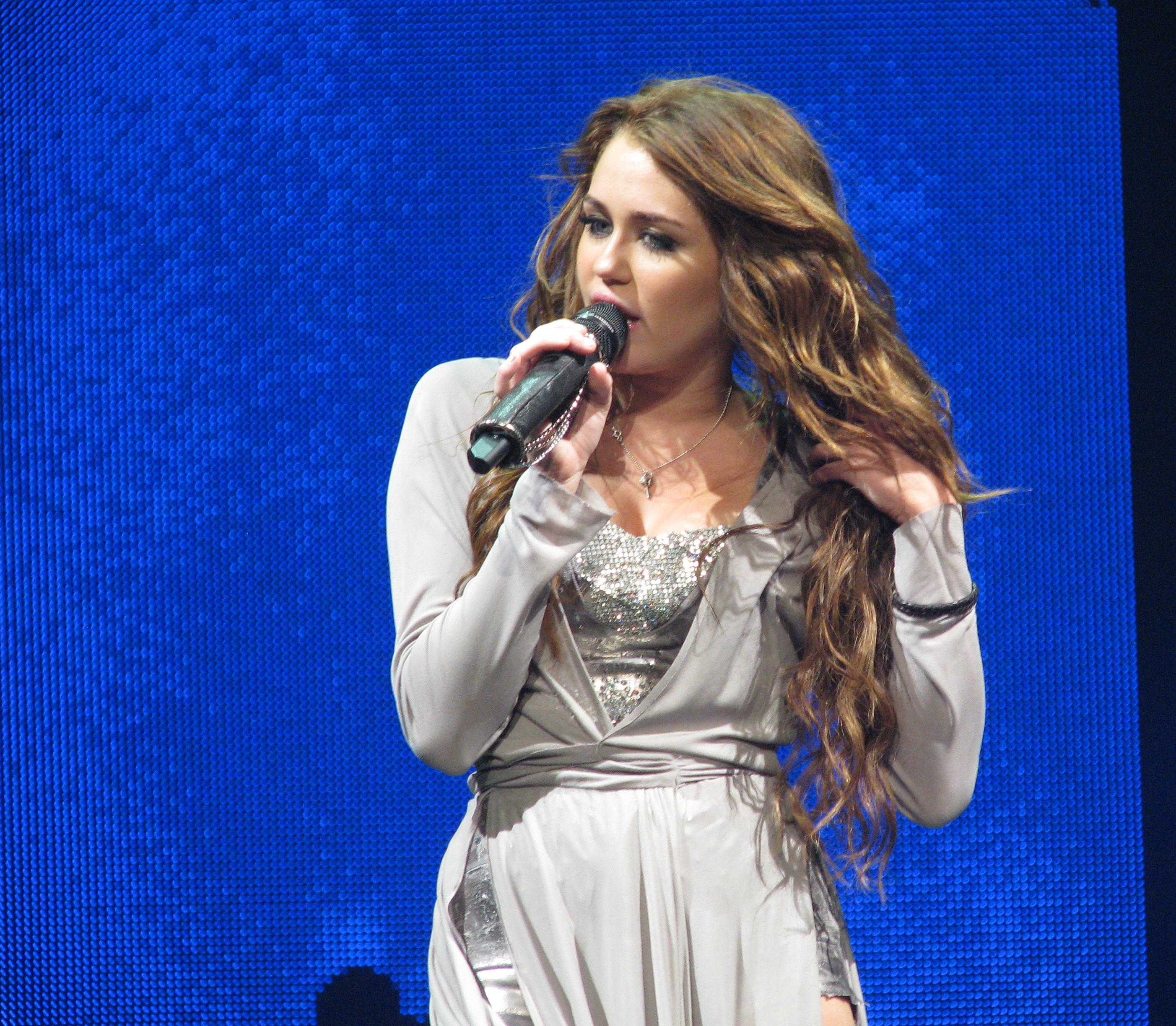 A teen singing.